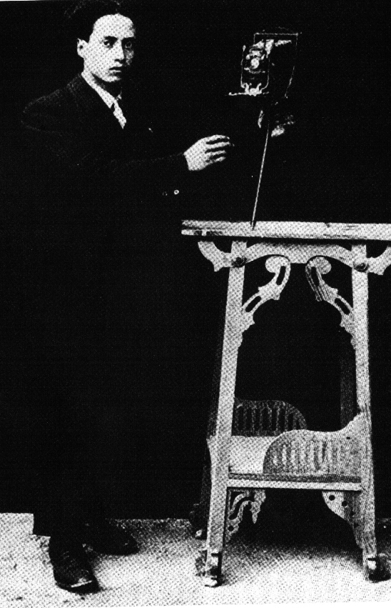 Saverio Marra Fotografo